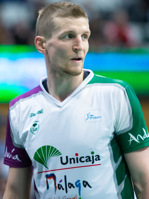 Adam Waczynski en un partido de la liga ACB en el Palau Olímpic de Badalona entre el Divina Seguros Joventut y el Unicaja.